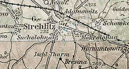 Der Ischlturm südlich von Groß Strehlitz in Oberschlesien auf einer österreichisch-ungarischen Karte von 1890.